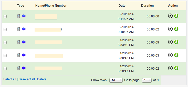 Монгол: Дуудлаг бүрийг record хийн харж буй байдал